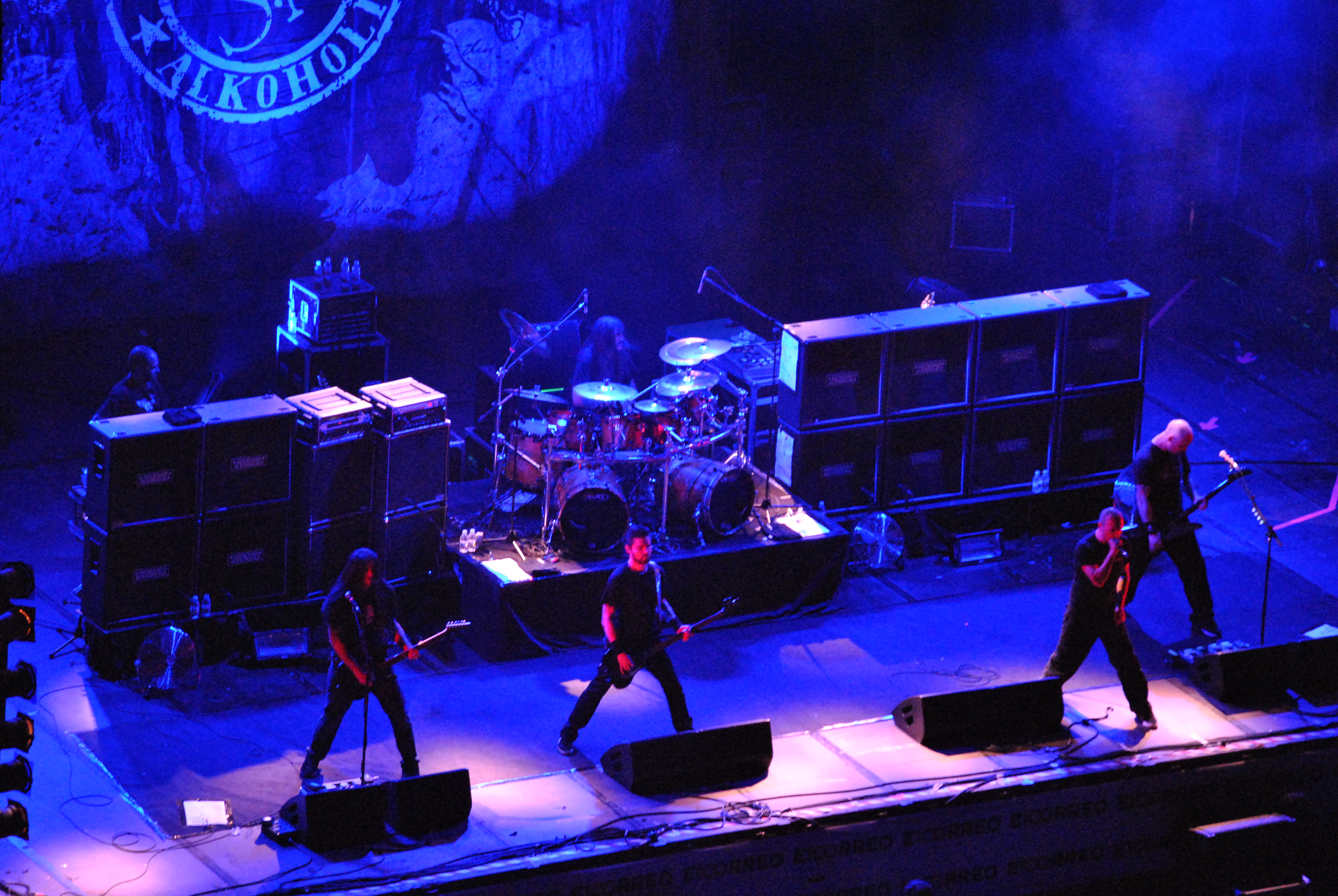 Foto tomada de un directo de Soziedad Alkoholika